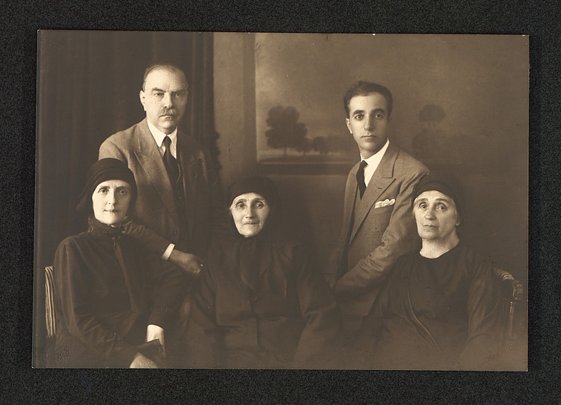 Милан Матов, Владимир Асенков, Славка Пушкарова